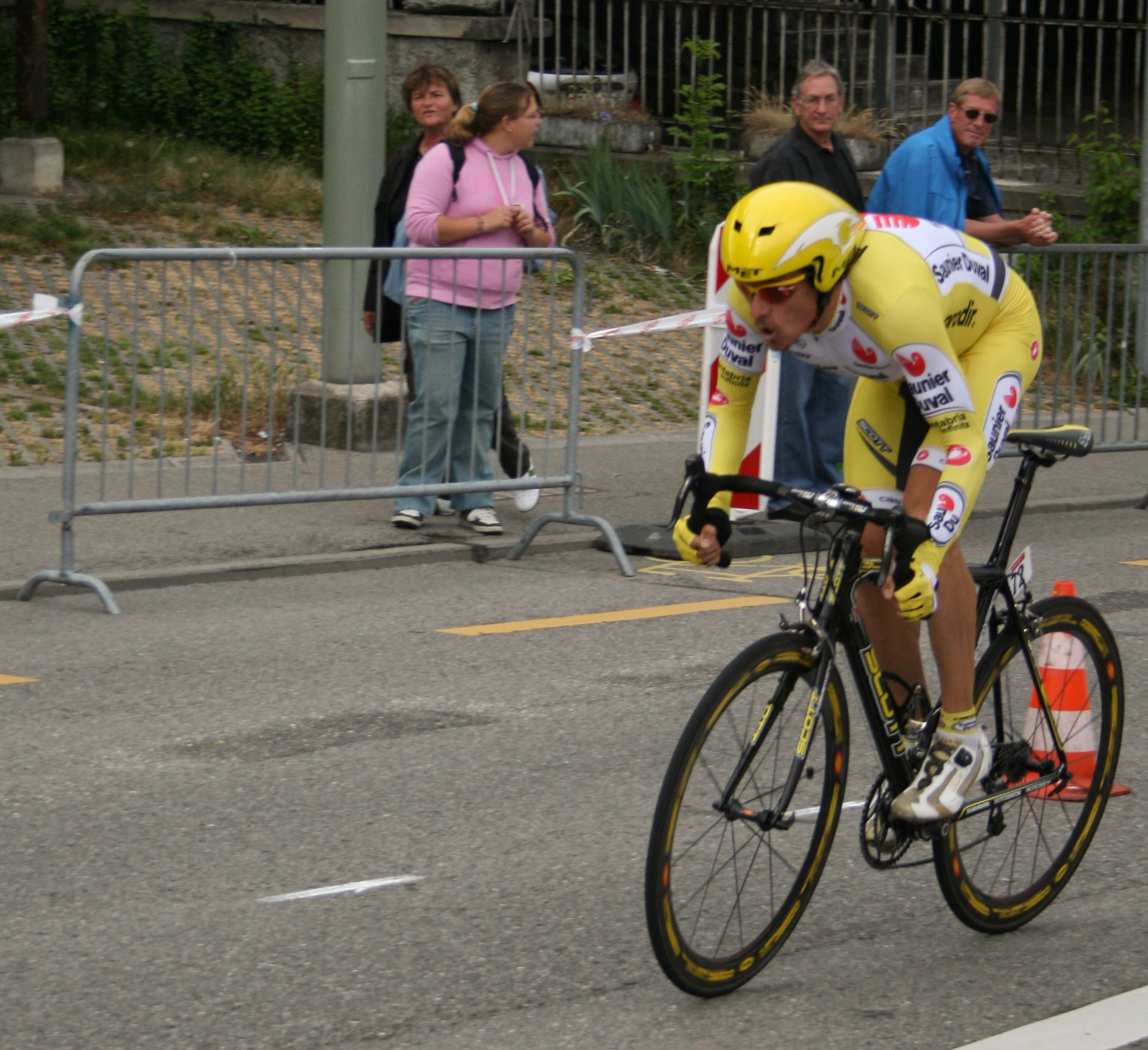 David Canada Gracia prologue du Tour de Romandie 2007